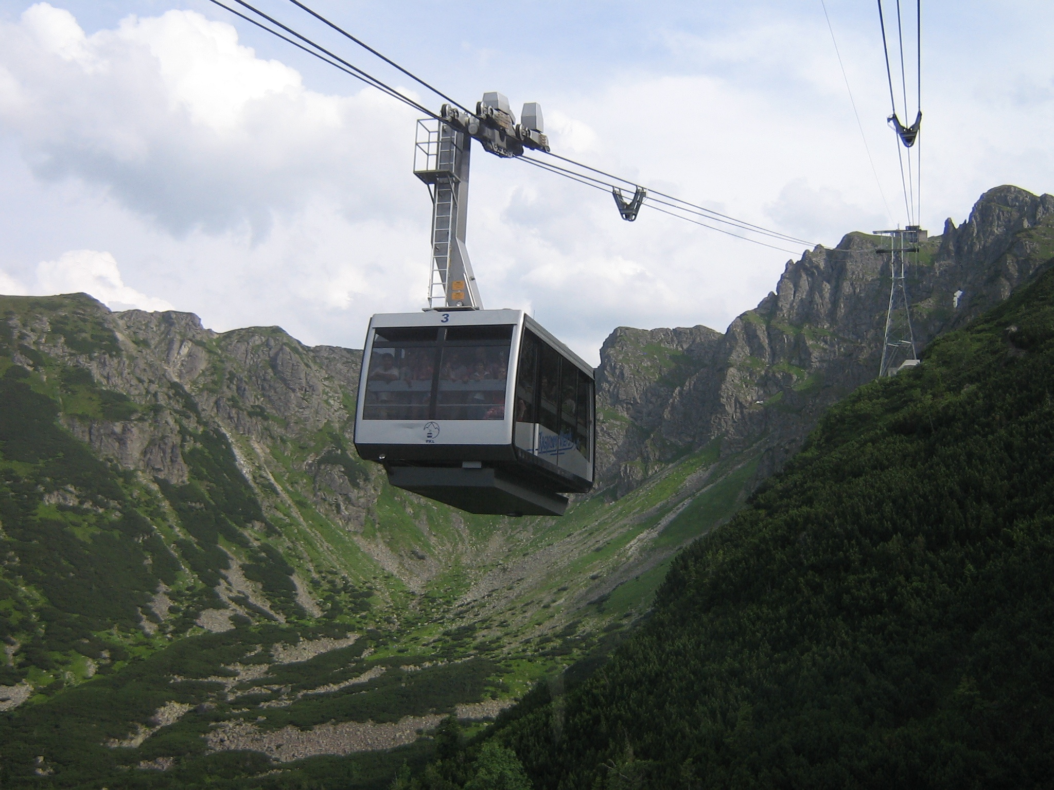 Kolejka na Kasprowy Wierch